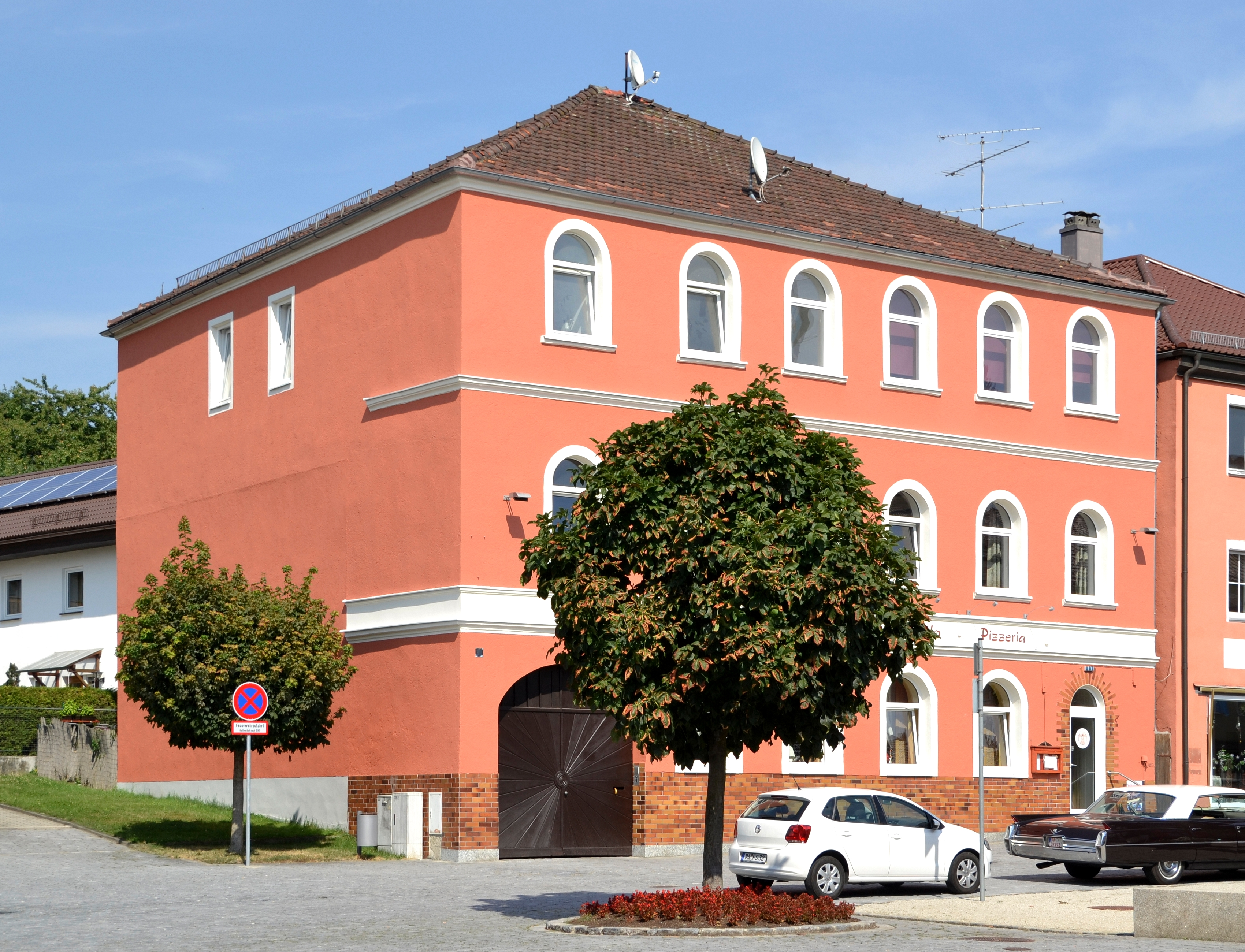 Walmdachbau, derzeit eine Pizzeria (2012/2013) in Aidenbach (Marktplatz 30).